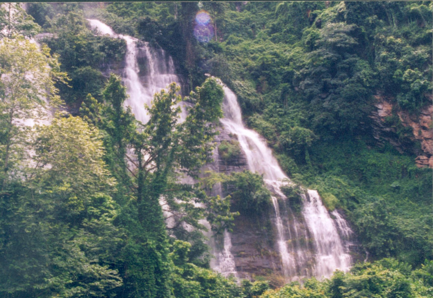 Photo personnelle. Ces chutes d'eau sont à plus ou moins cinq kilomètre de la ville. C'est un endroit agréable et romantique.